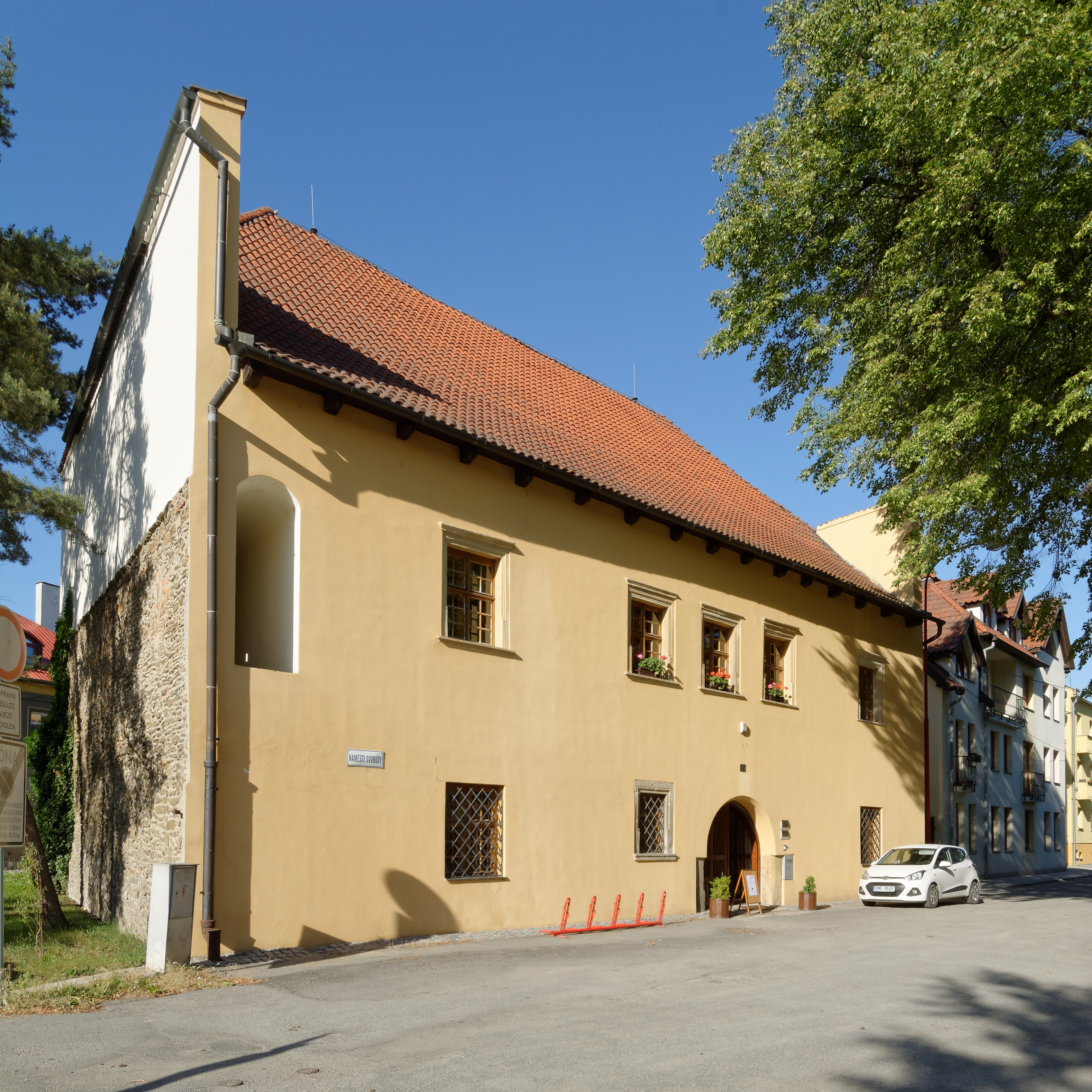 Špitál, náměstí Svobody 675/11, Litovel.